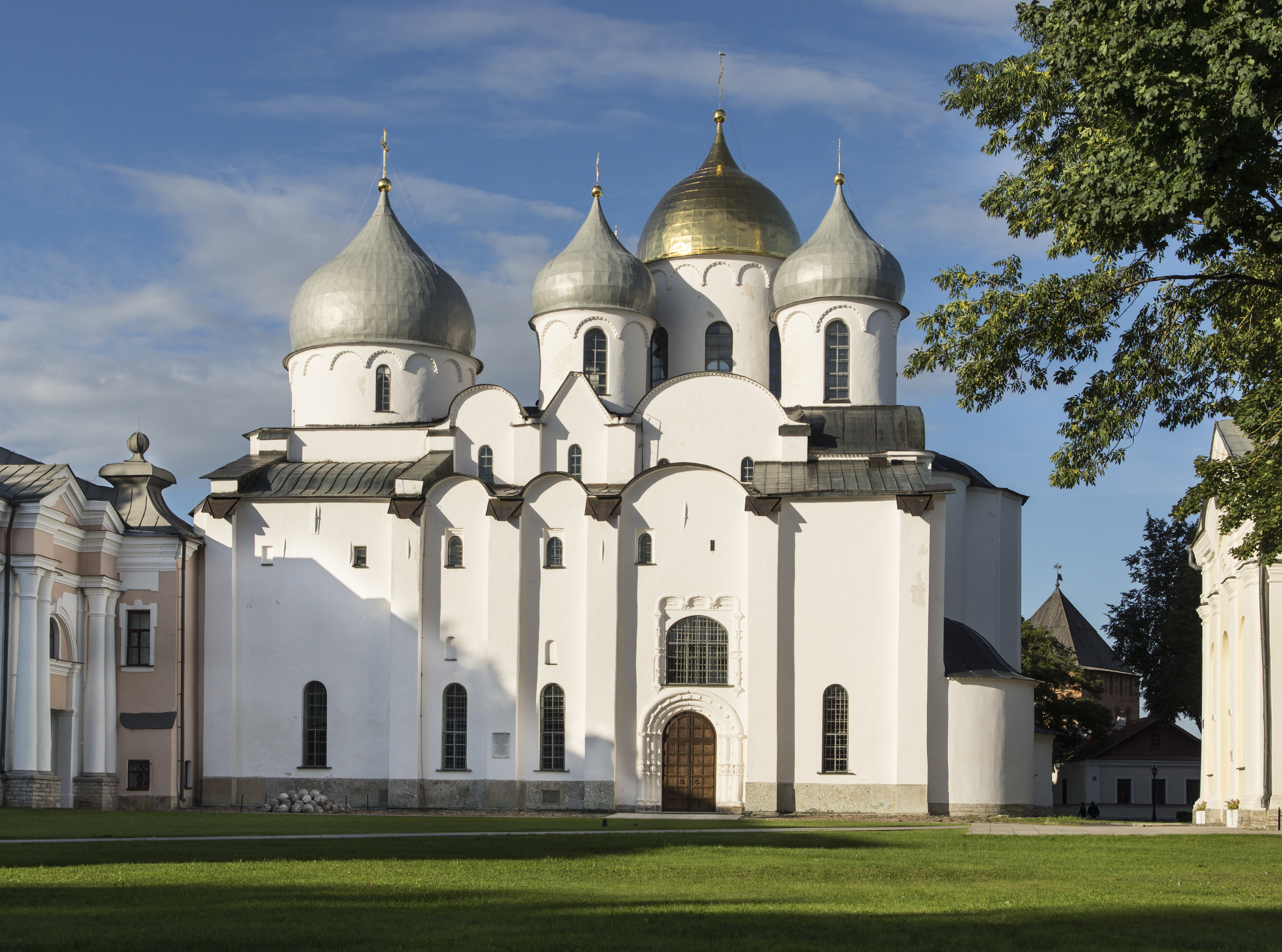 СОБОР СОФИЙСКИЙ - АНСАМБЛЬ НОВГОРОДСКОГО КРЕМЛЯ